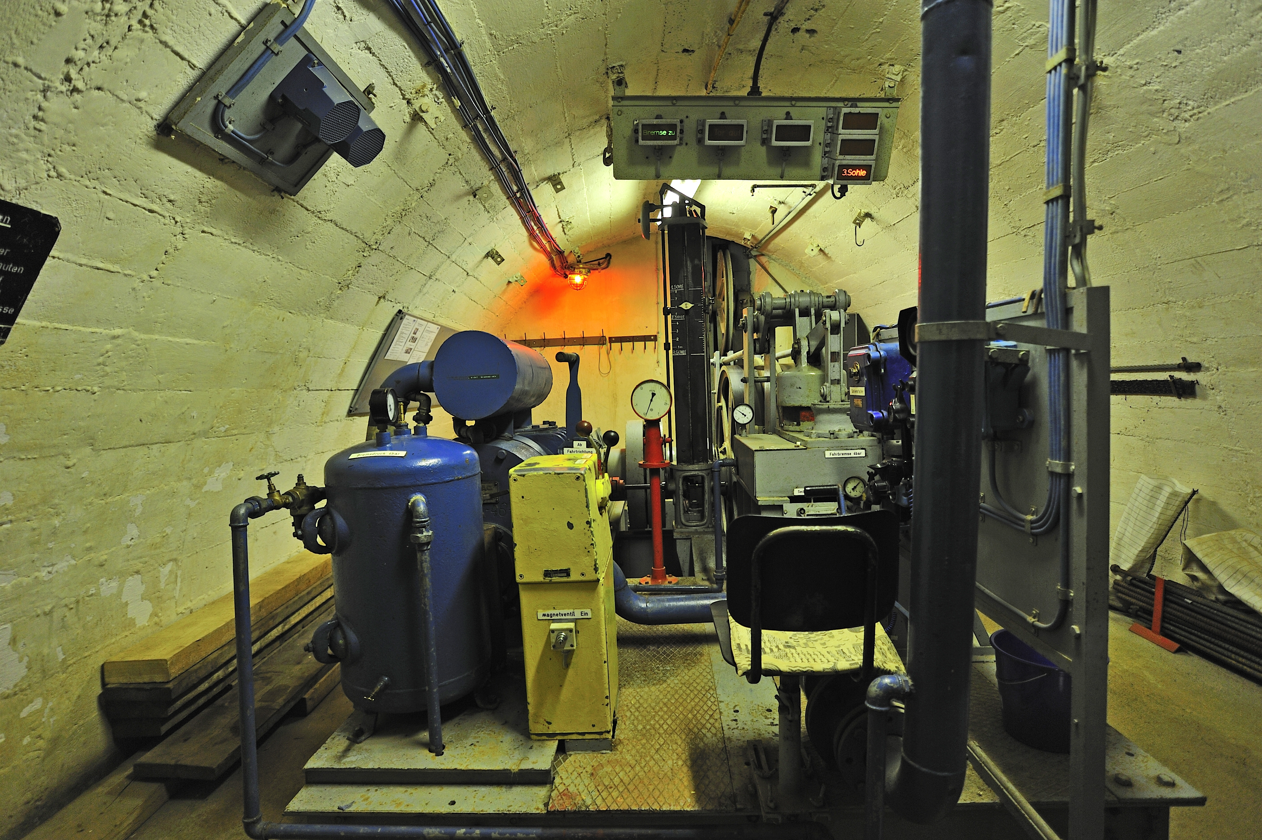 Maschinenraum des Blindschachtes im Erlebnisbergwerk Velsen e.V.